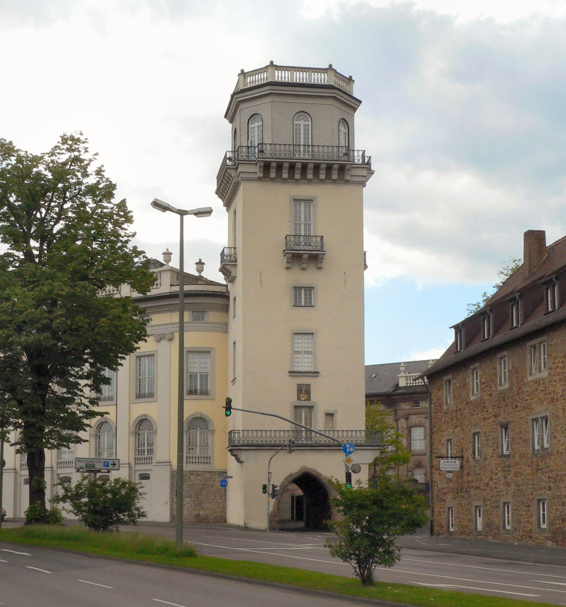 Zwehrenturm in Kassel, vom Steinweg aus gesehen